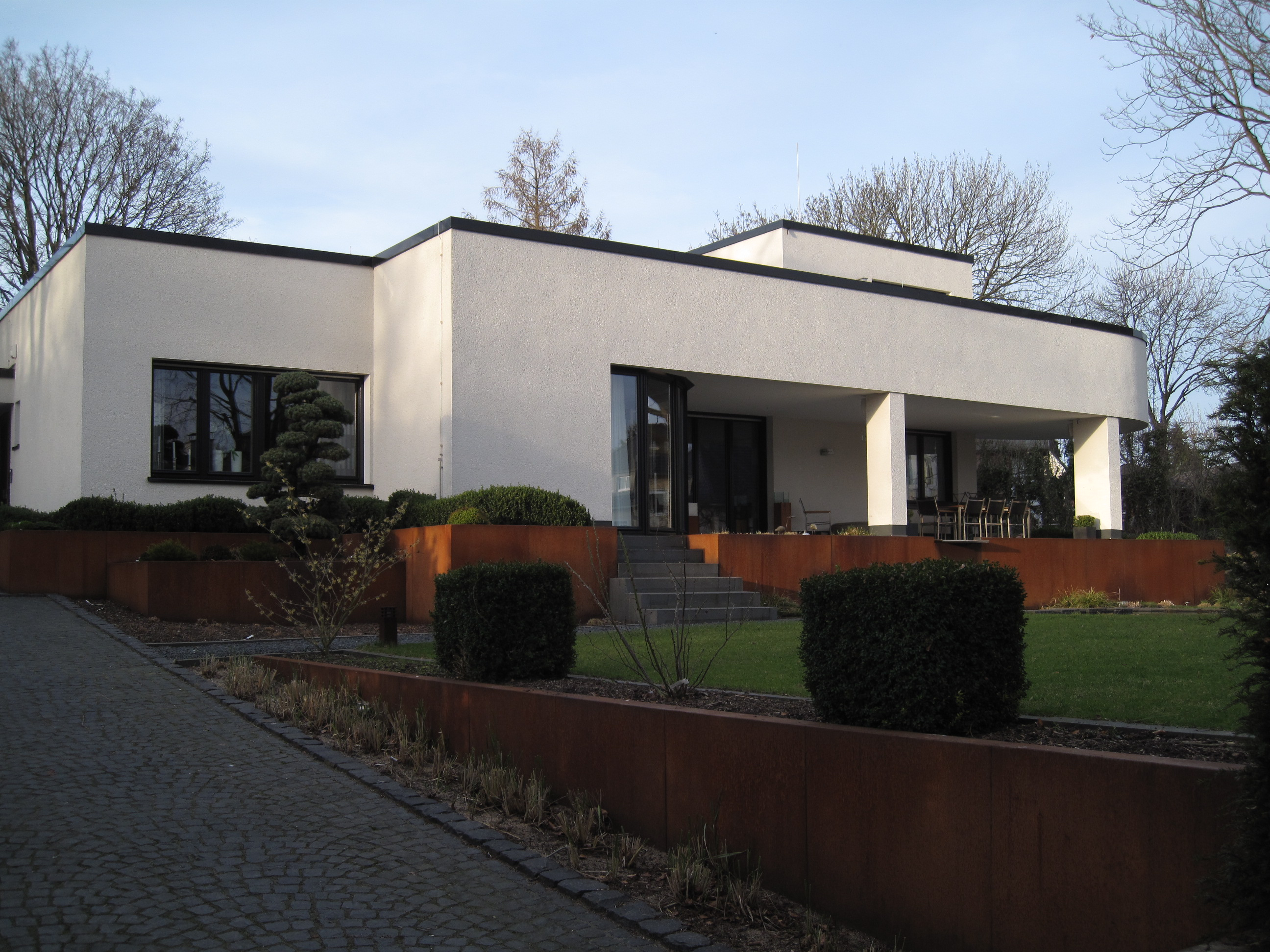 Villa Klute in Iserlohn, An den Sieben Gäßchen 9. Denkmalschutz seit 16. Mai 1988, designed by Manfred Faber.